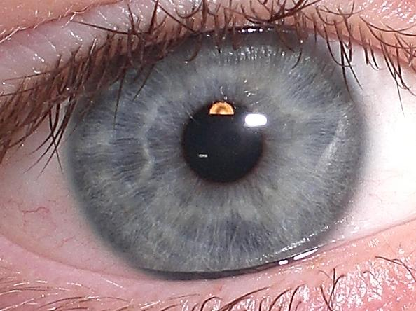 my eye